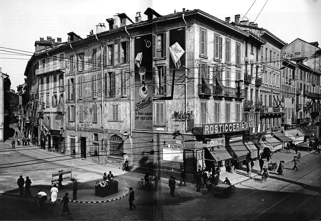 Milano, la via Bagutta liberata dalle demolizioni per la realizzazione di piazza San Babila